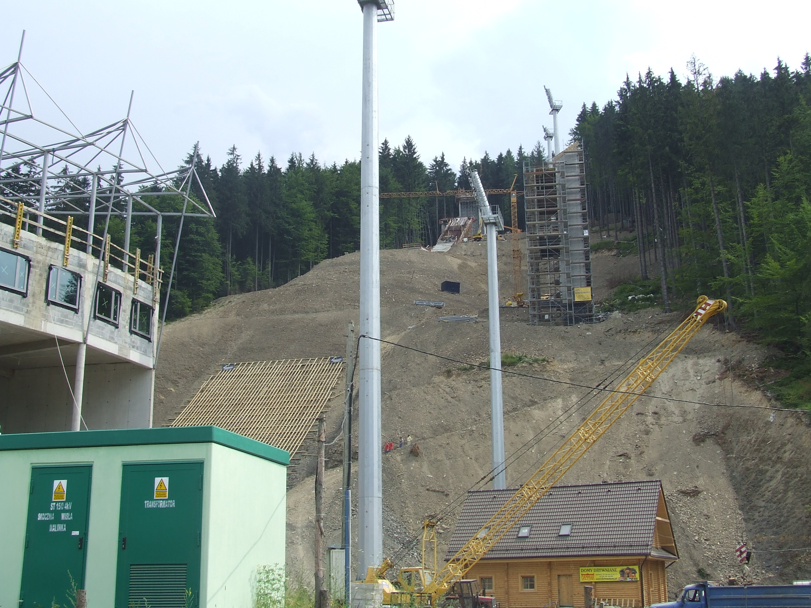 Remont skoczni "Malinka" w Wiśle. Autor: Walther, lipiec 2006